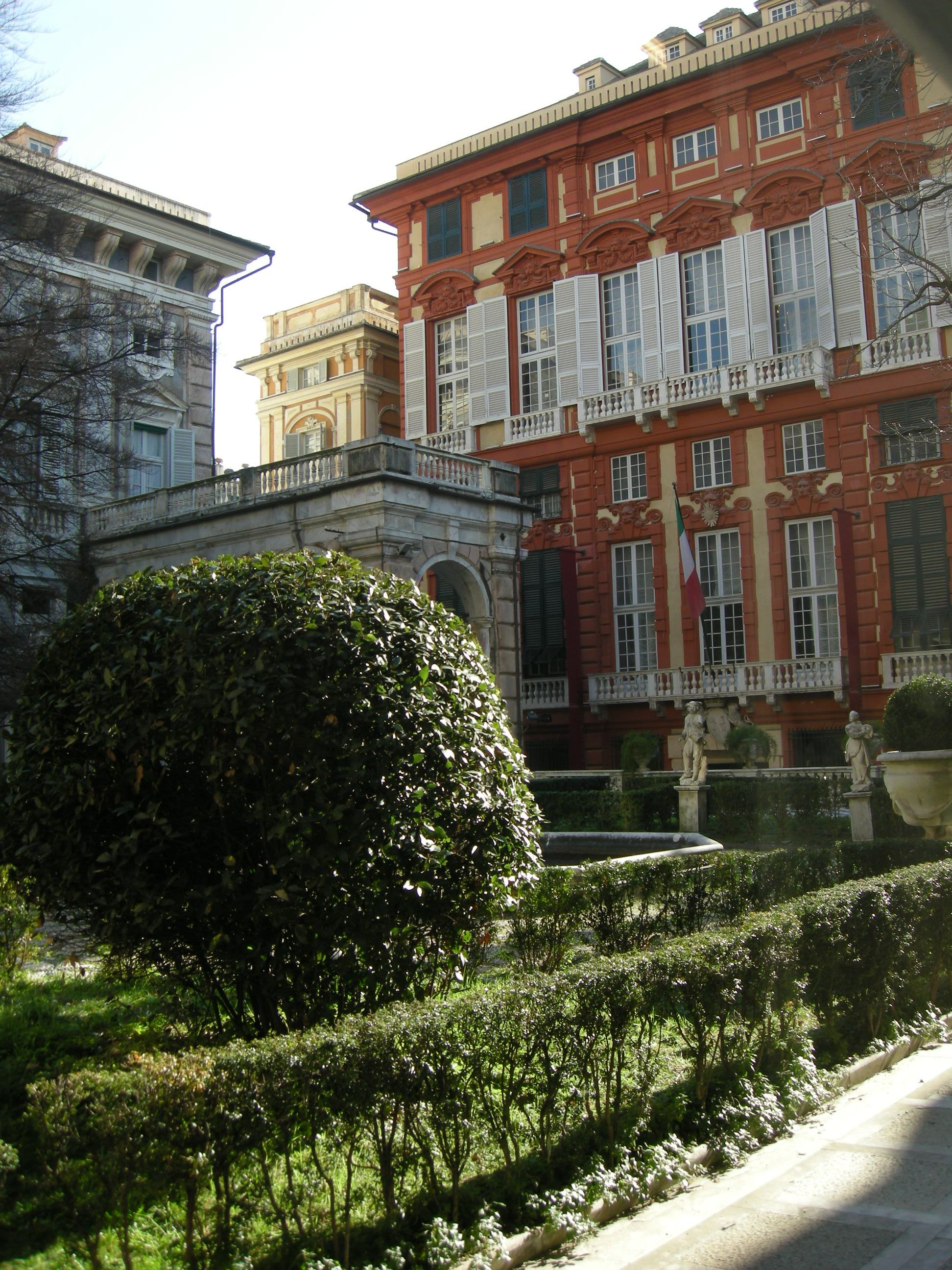 Palazzo rosso visto da palazzo bianco